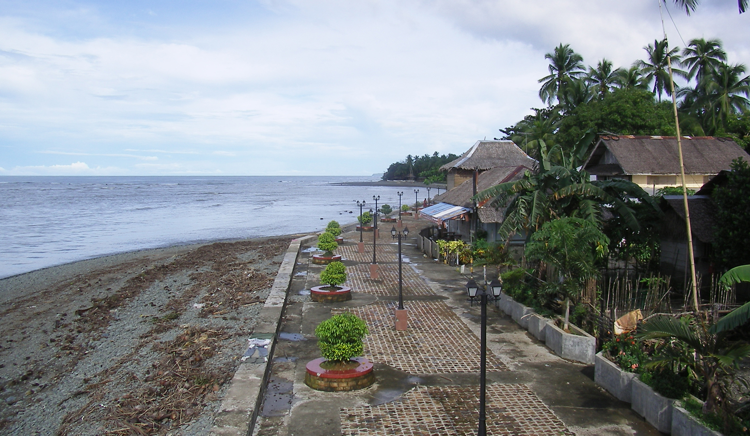 Strand in Lanuza, auf Mindanao (Philippinen)